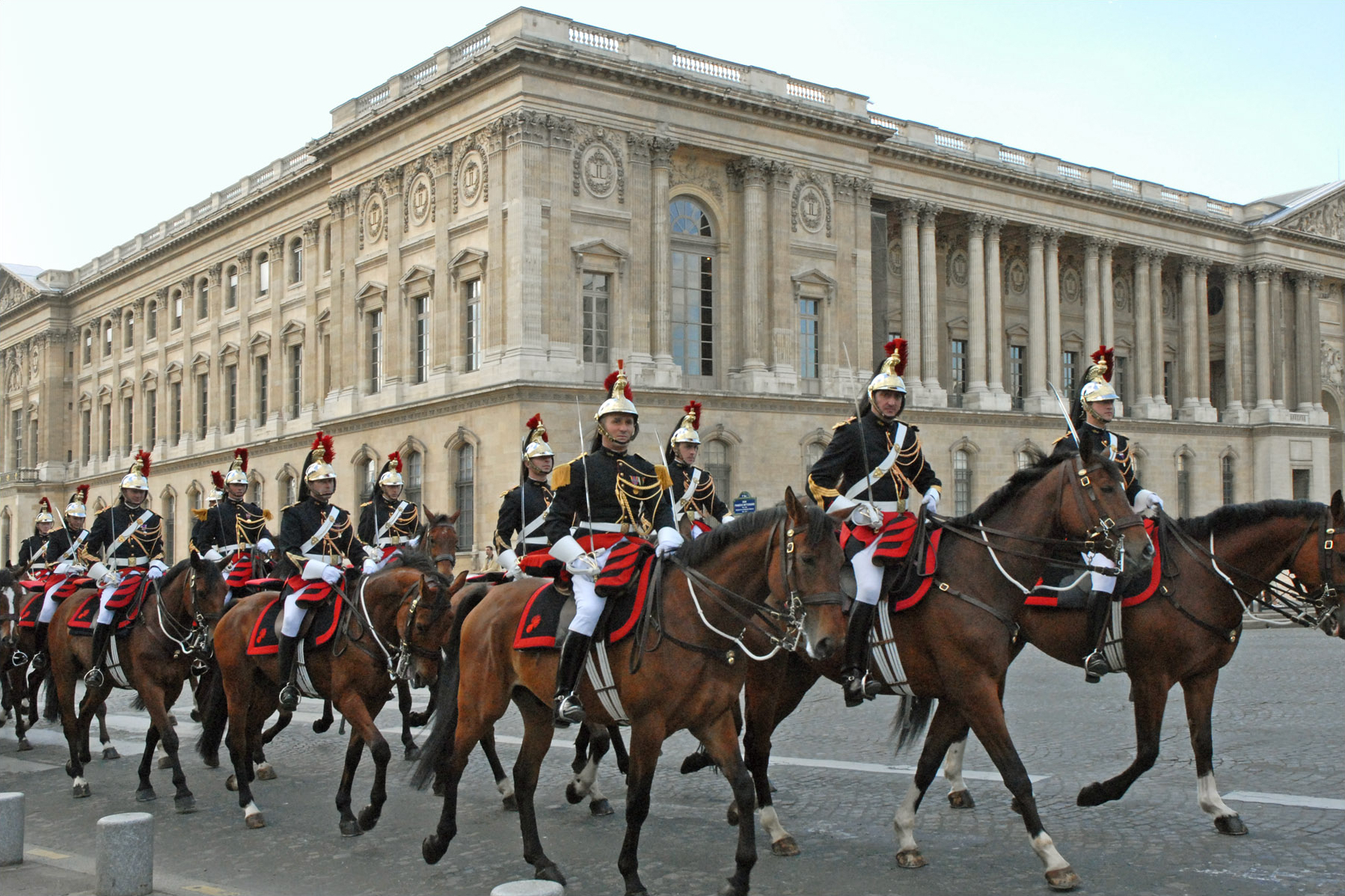 La Garde républicaine, passant devant le palais du Louvre, au retour de Versailles où elle a rendu les honneurs au Congrès devant lequel le Président Nicolas Sarkozy s'est exprimé le 22 juin 2009, pour la première fois depuis la IIIème République.